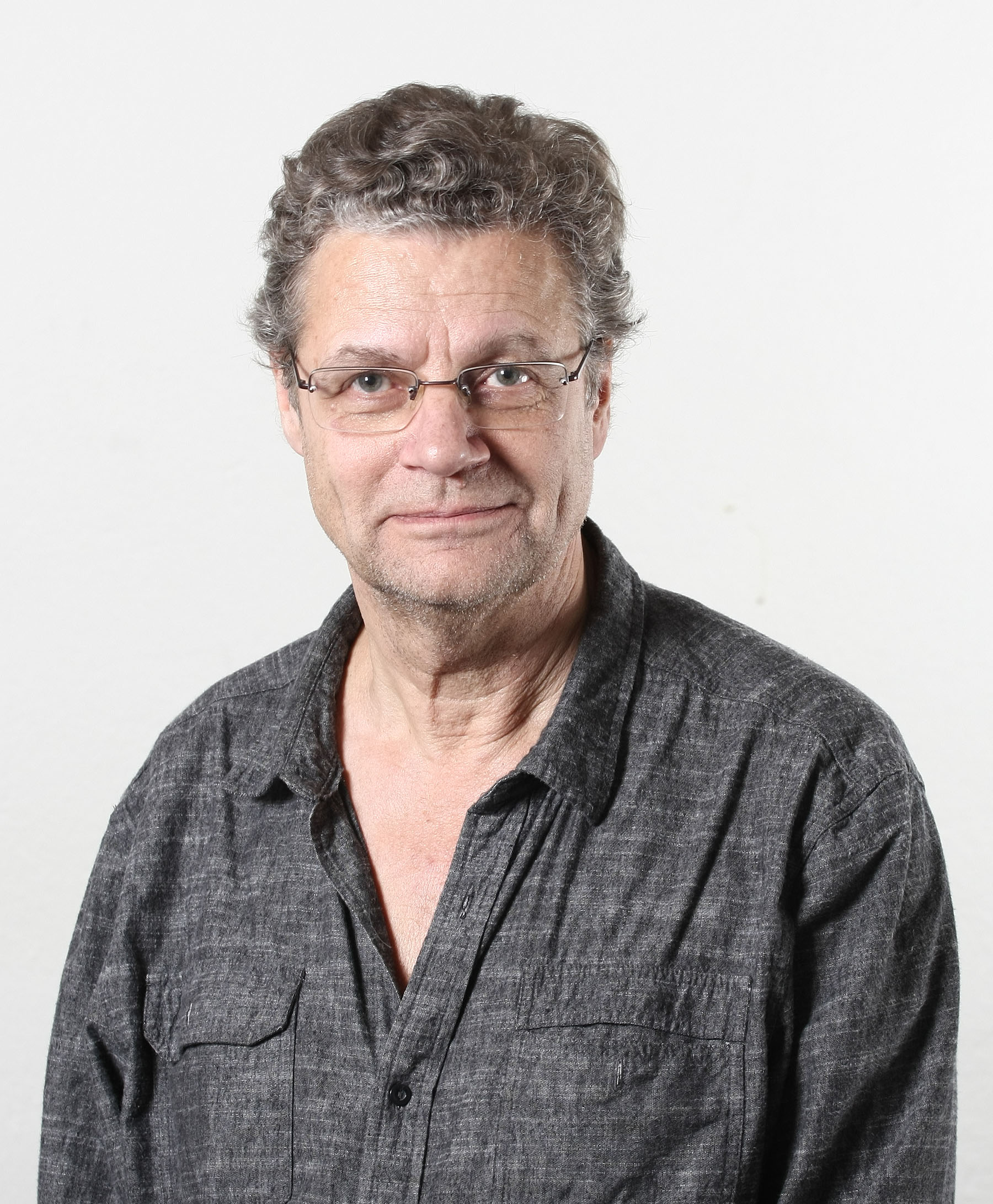 Historikern Håkan Blomqvist